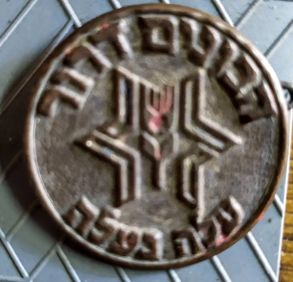 סיכת התנועה - הבונים דרור